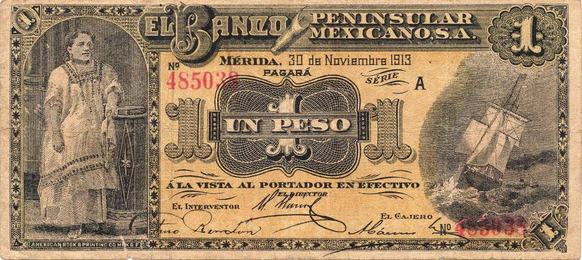 Billete de 1 peso del Banco Peninsular Mexicano emitido en 1913.